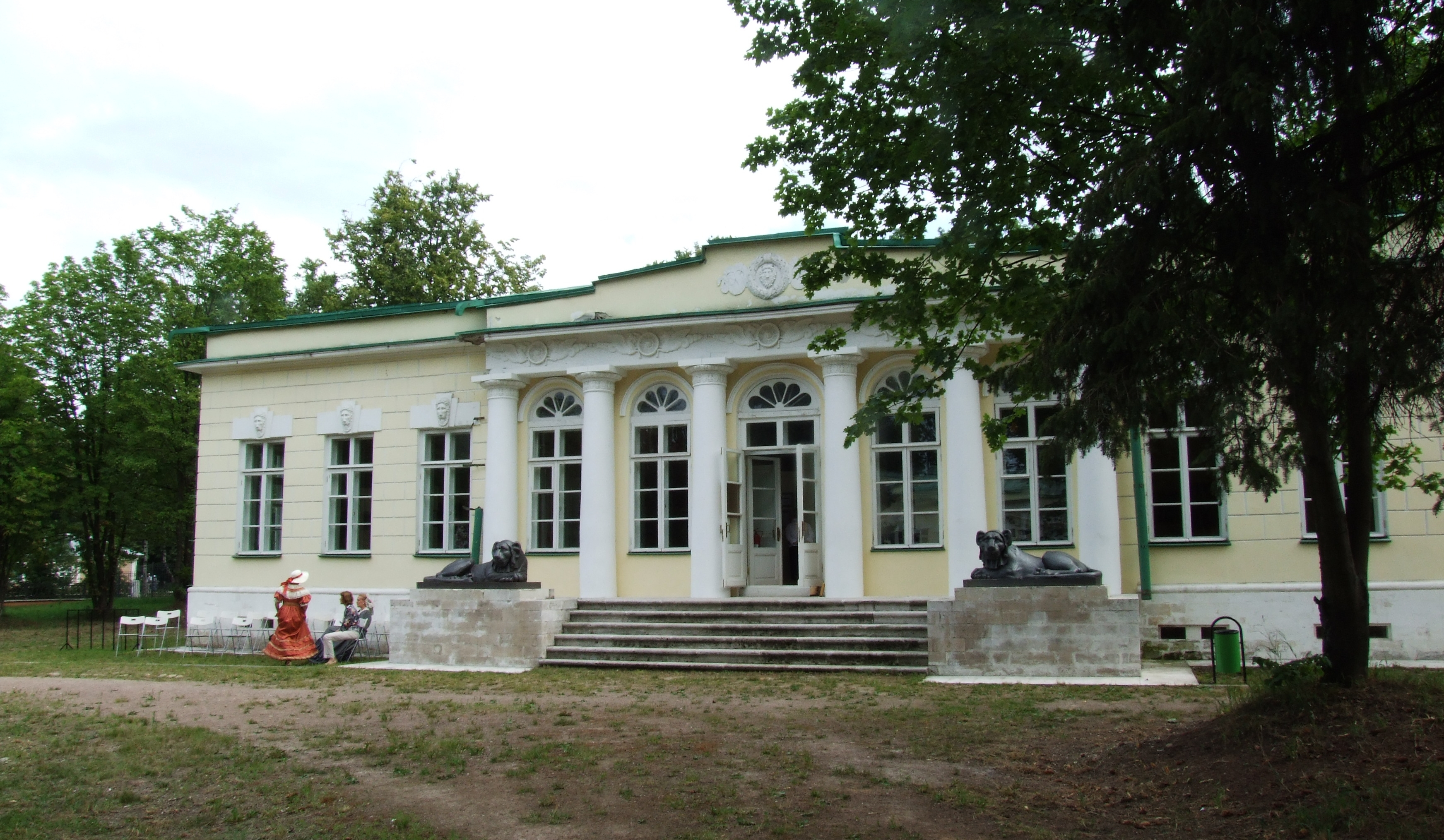 Кузьминки. Флигель